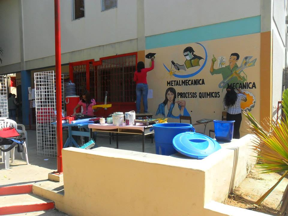 mural iutc